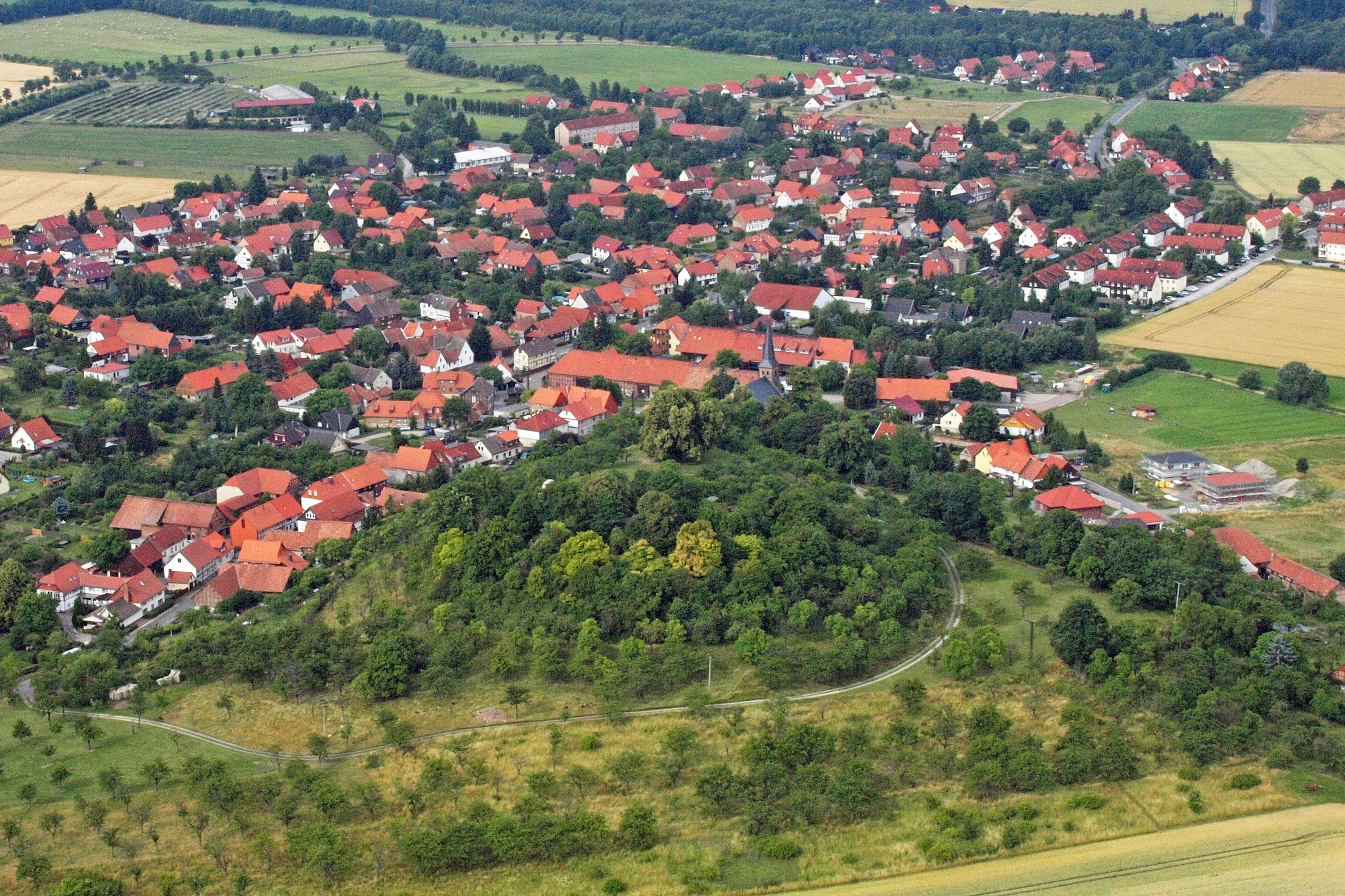 Der Stapelburger Burgberg, Luftaufnahme (2015)